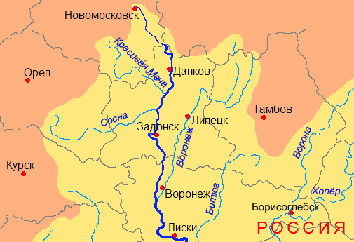 Схема бассейна Дона